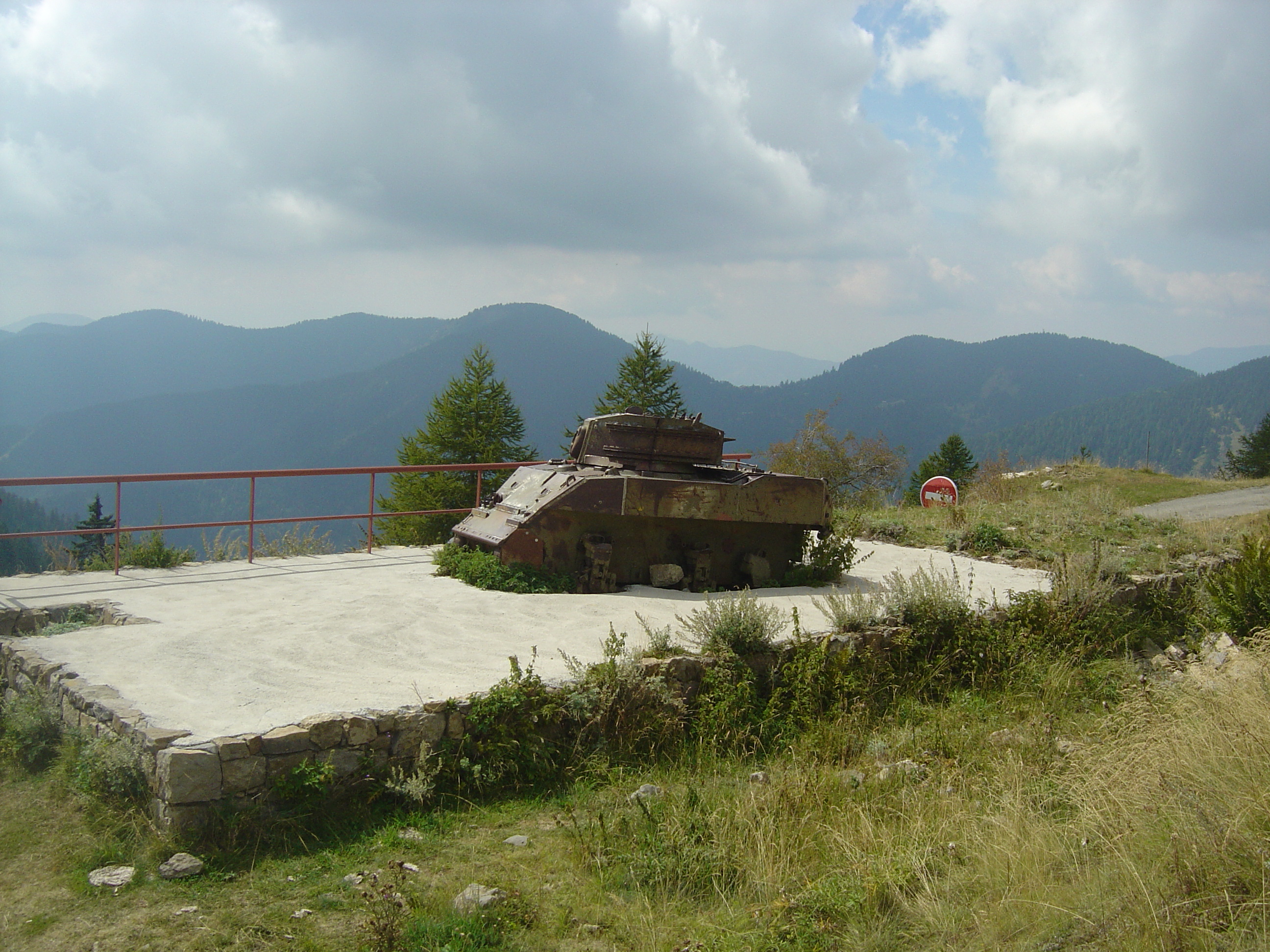 Char Stuart M5 au camp de Cabanes Vieilles (1780m)